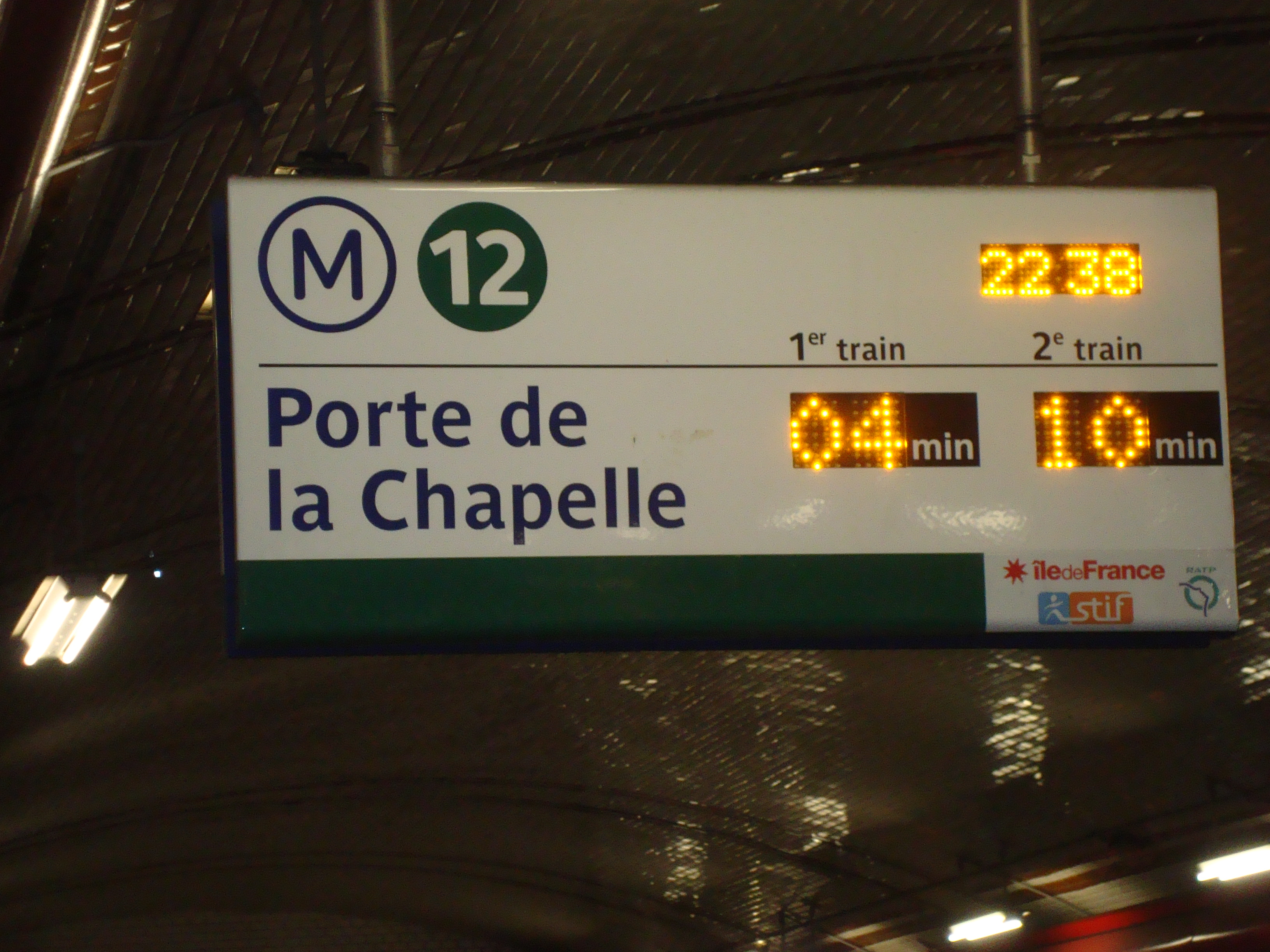 Station Volontaires de la ligne 12 du métro de Paris. Système SIEL.